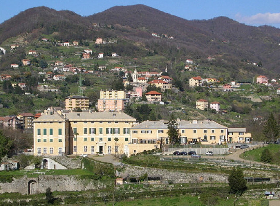 Villa Cambiaso (Cremeno - Bolzaneto - Genova)